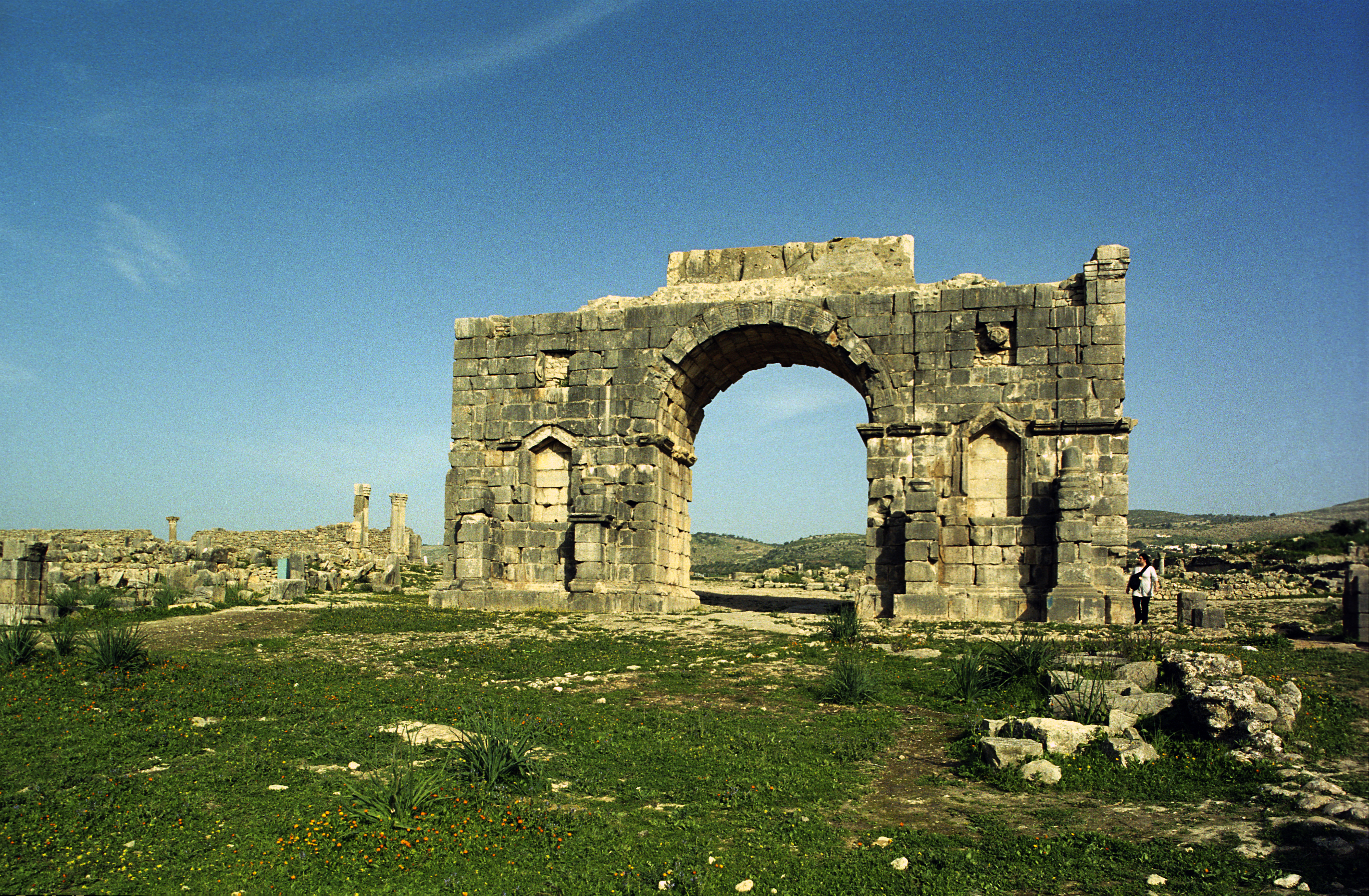 Volubilis, Marocco